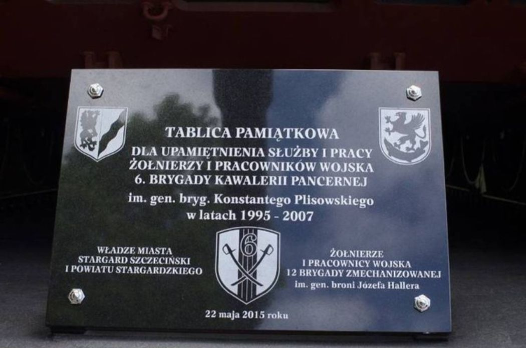 Tablica upamiętniająca żołnierzy 6BKPanc w kompleksie białe koszary